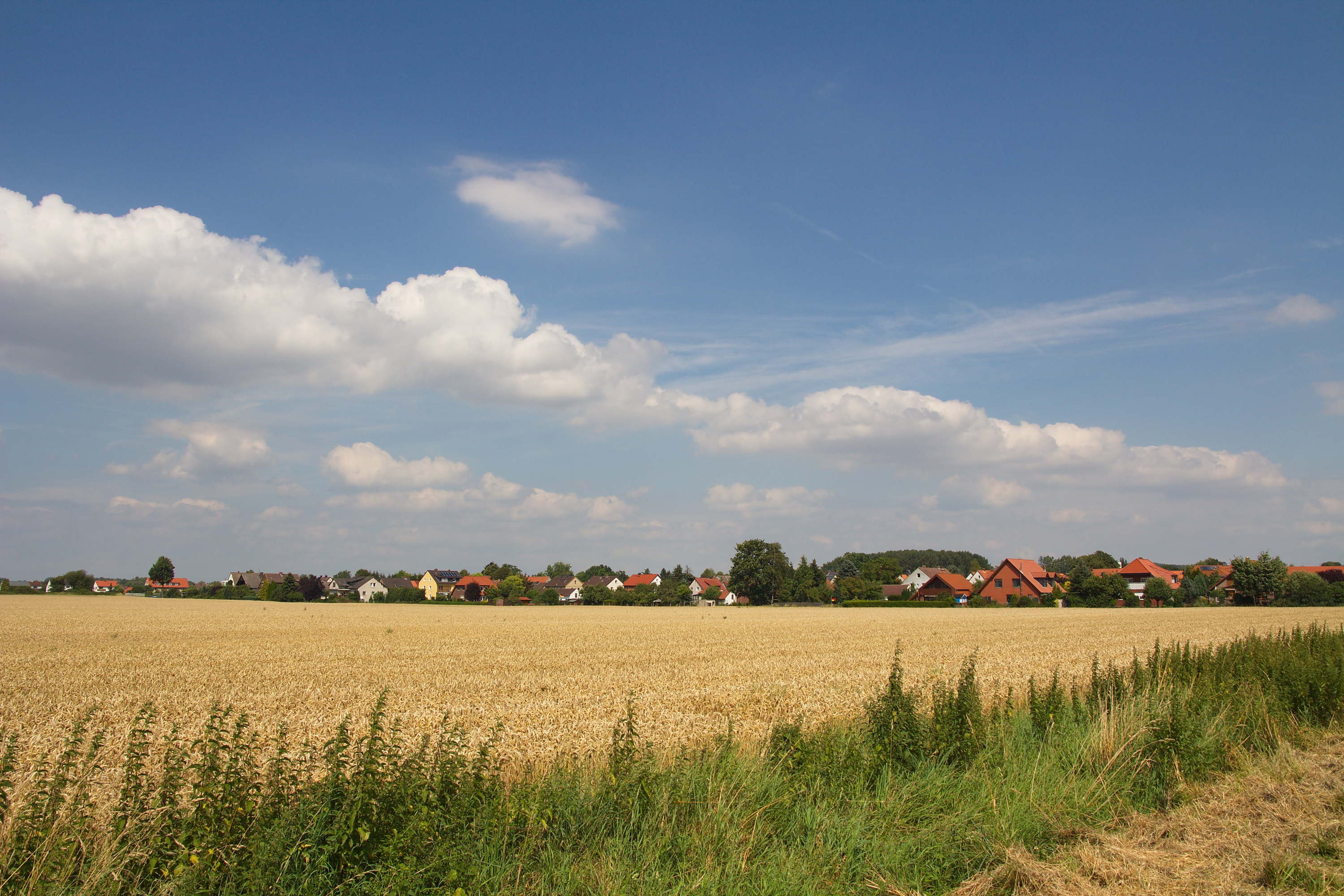 Blick auf Ohrum, Niedersachsen, Deutschland